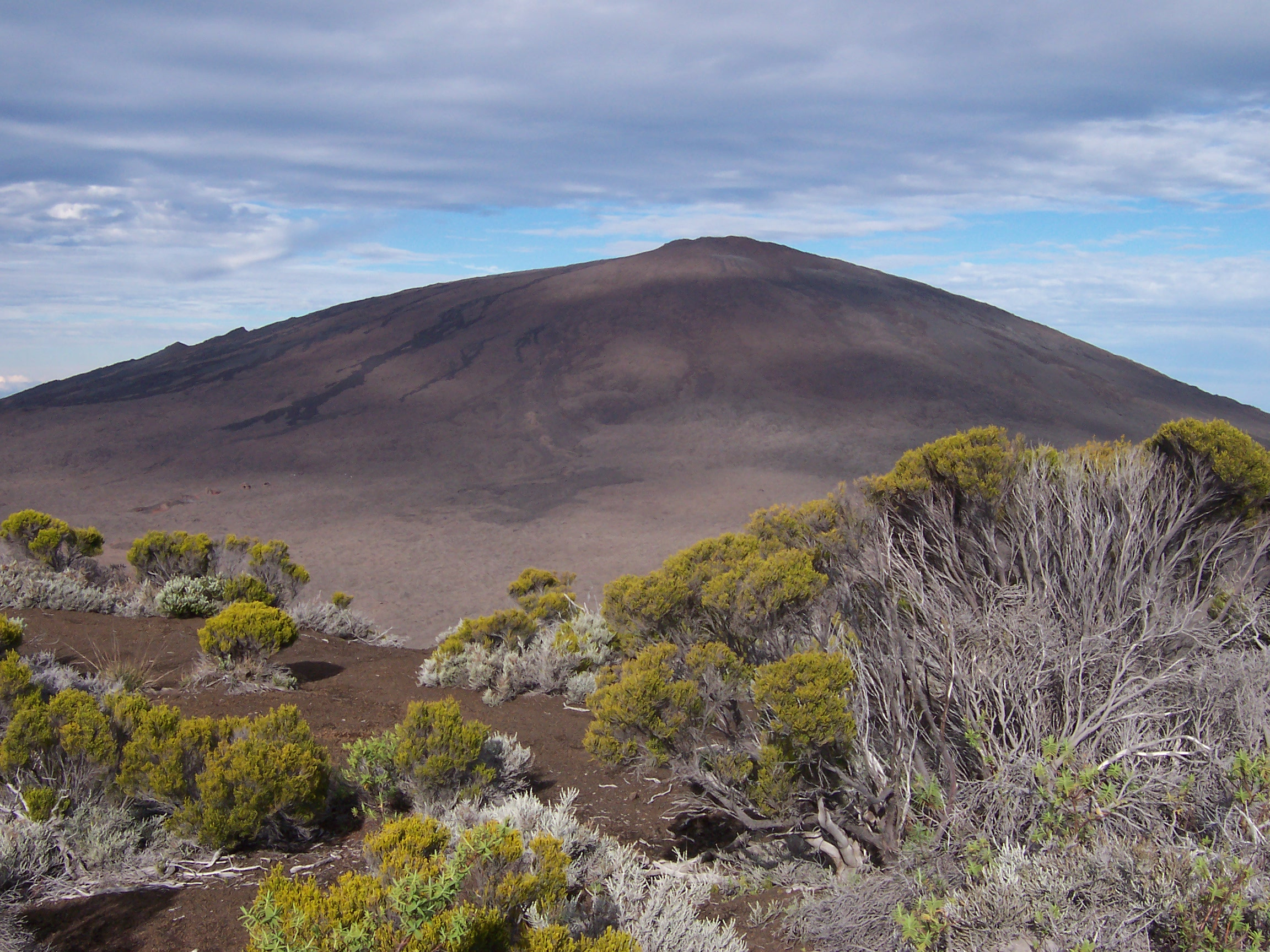 Piton de la Fournaise (Réunion island) seen close from the Pas de Bellecombe